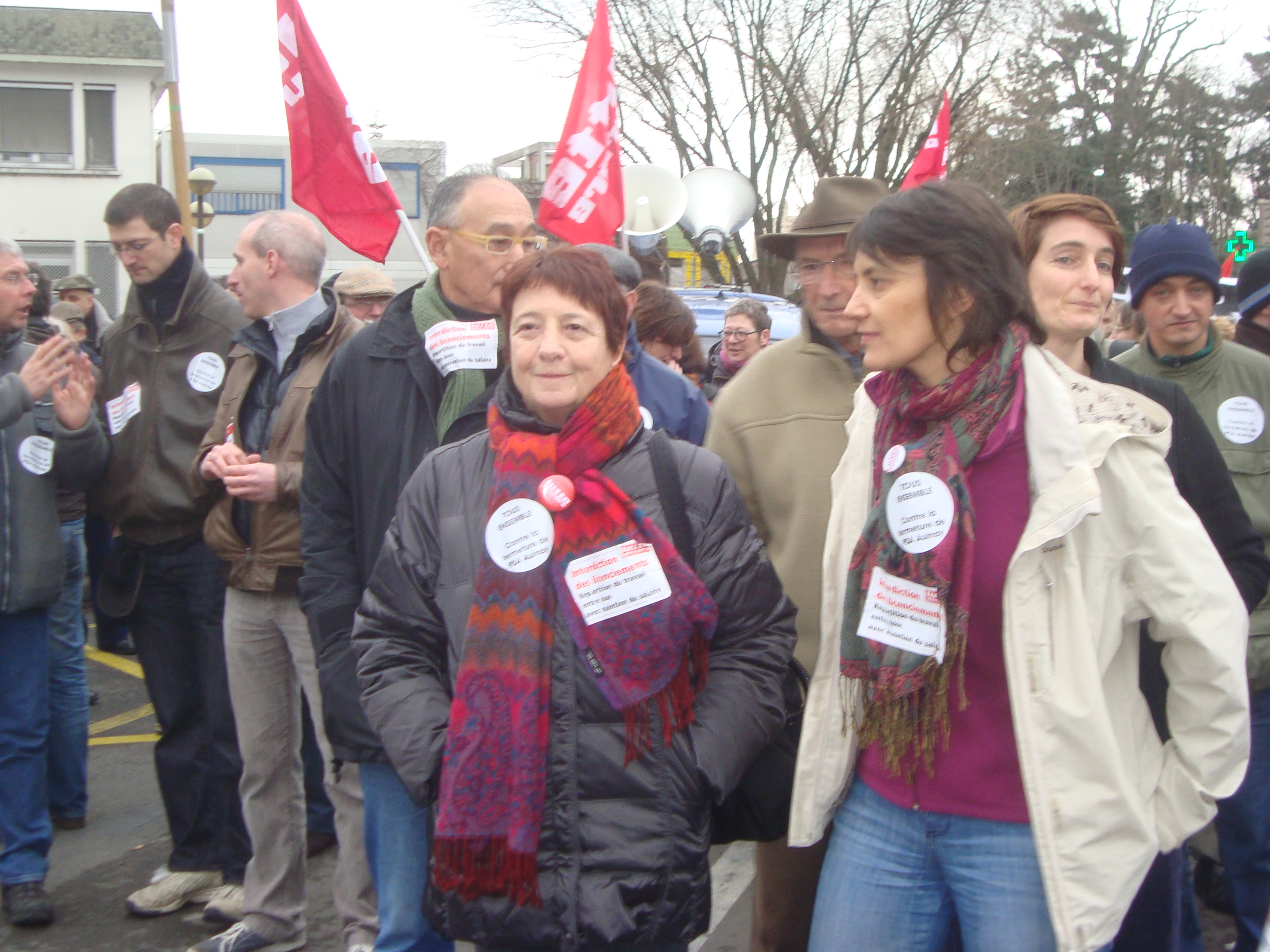 Arlette Laguillier et Nathalie Arthaud à la manifestation des salariés PSA d'Aulnay-sous-Bois le 18 février 2012